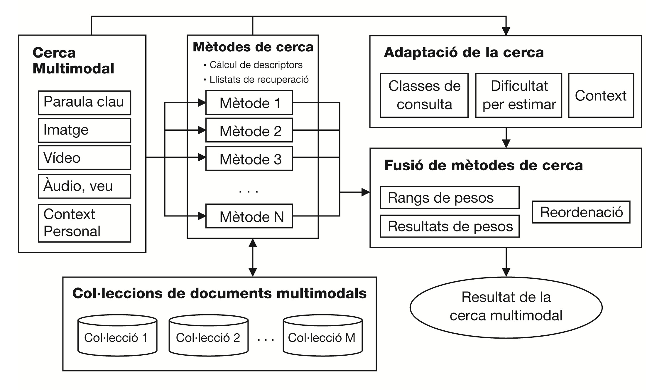 Esquema general del funcionament d'una cerca multimodal